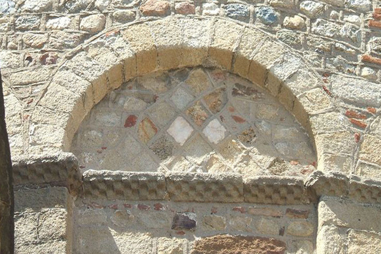 Elne_Cathedrale_AbsideMajeure, détail de la Décoration (11.-12. siècle)